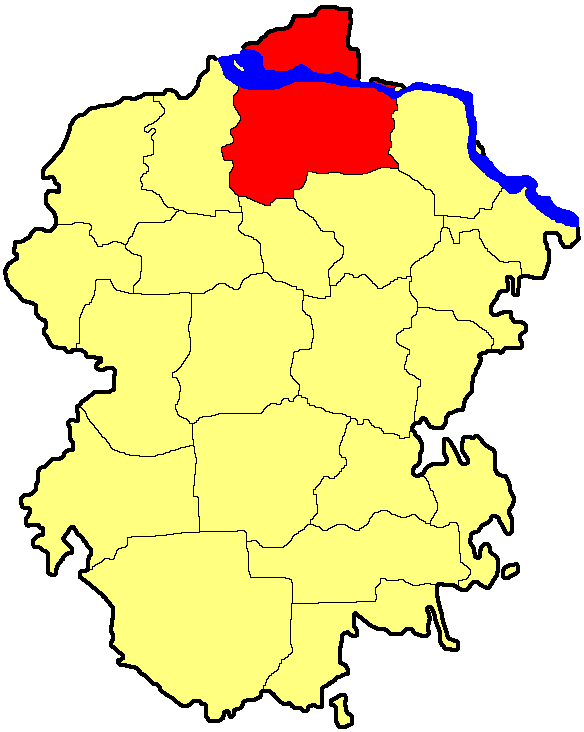 Чебоксарський район Чувашії